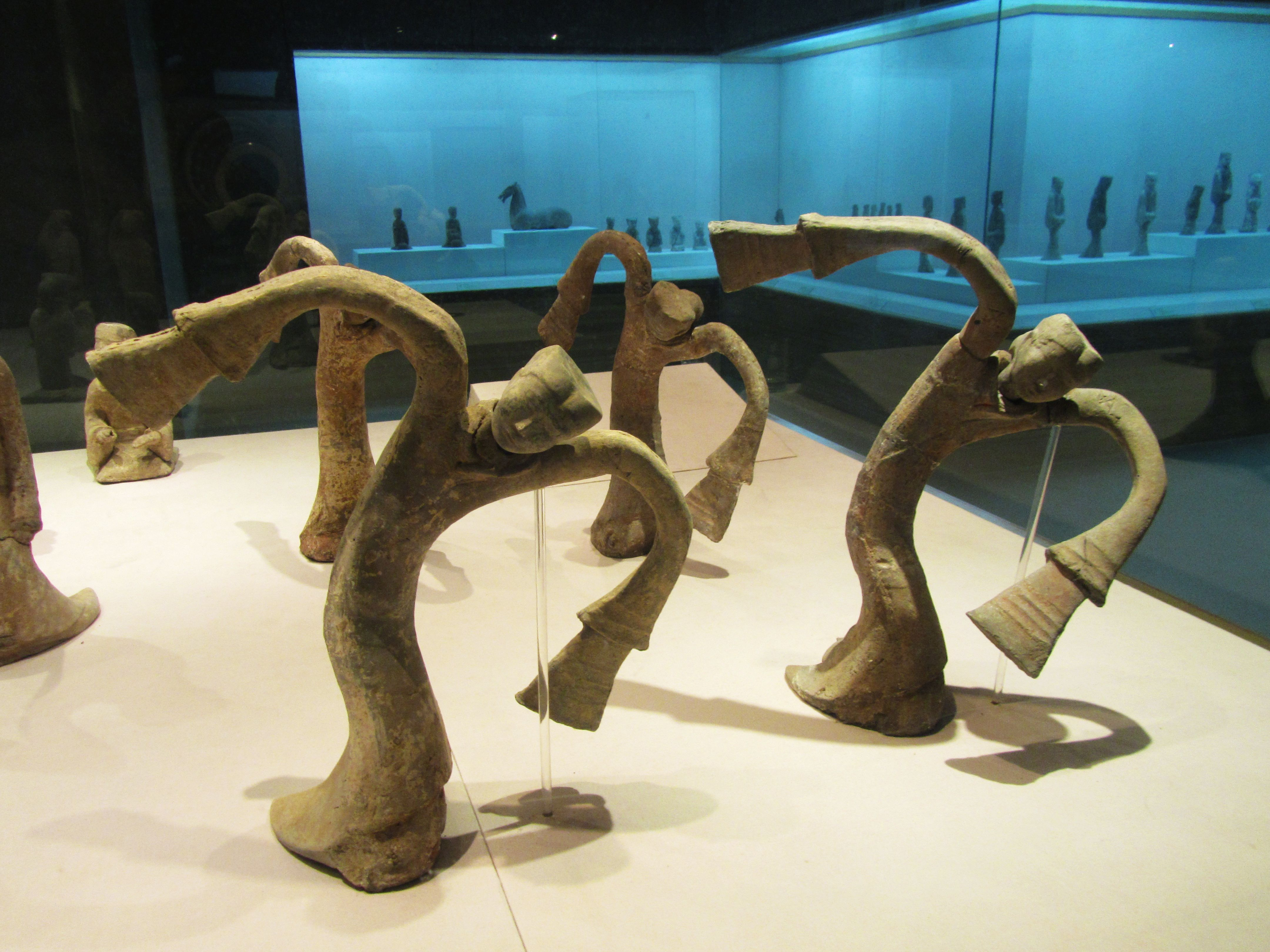 徐州博物馆藏西汉乐舞俑，驮篮山楚王墓出土。